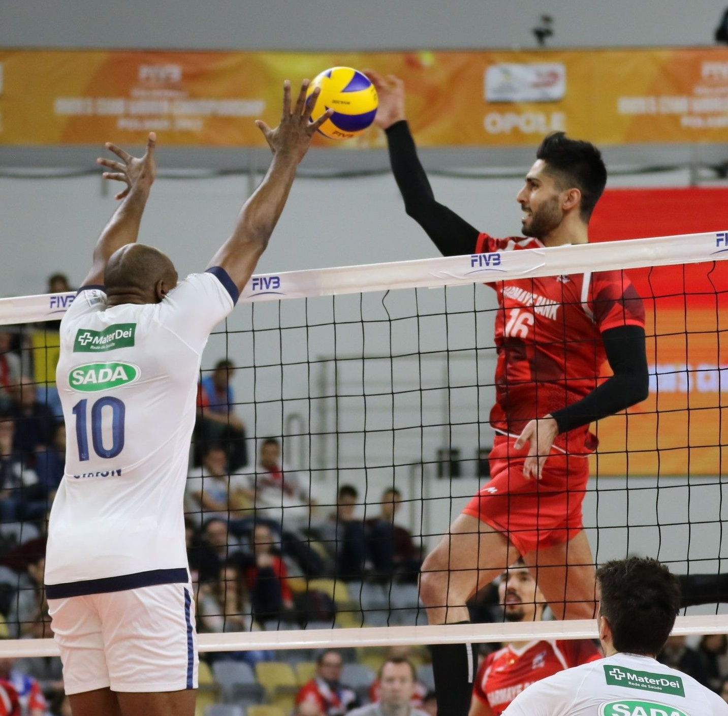 علی شفیعی در مقابل روبرت لندی سیمون کوبایی